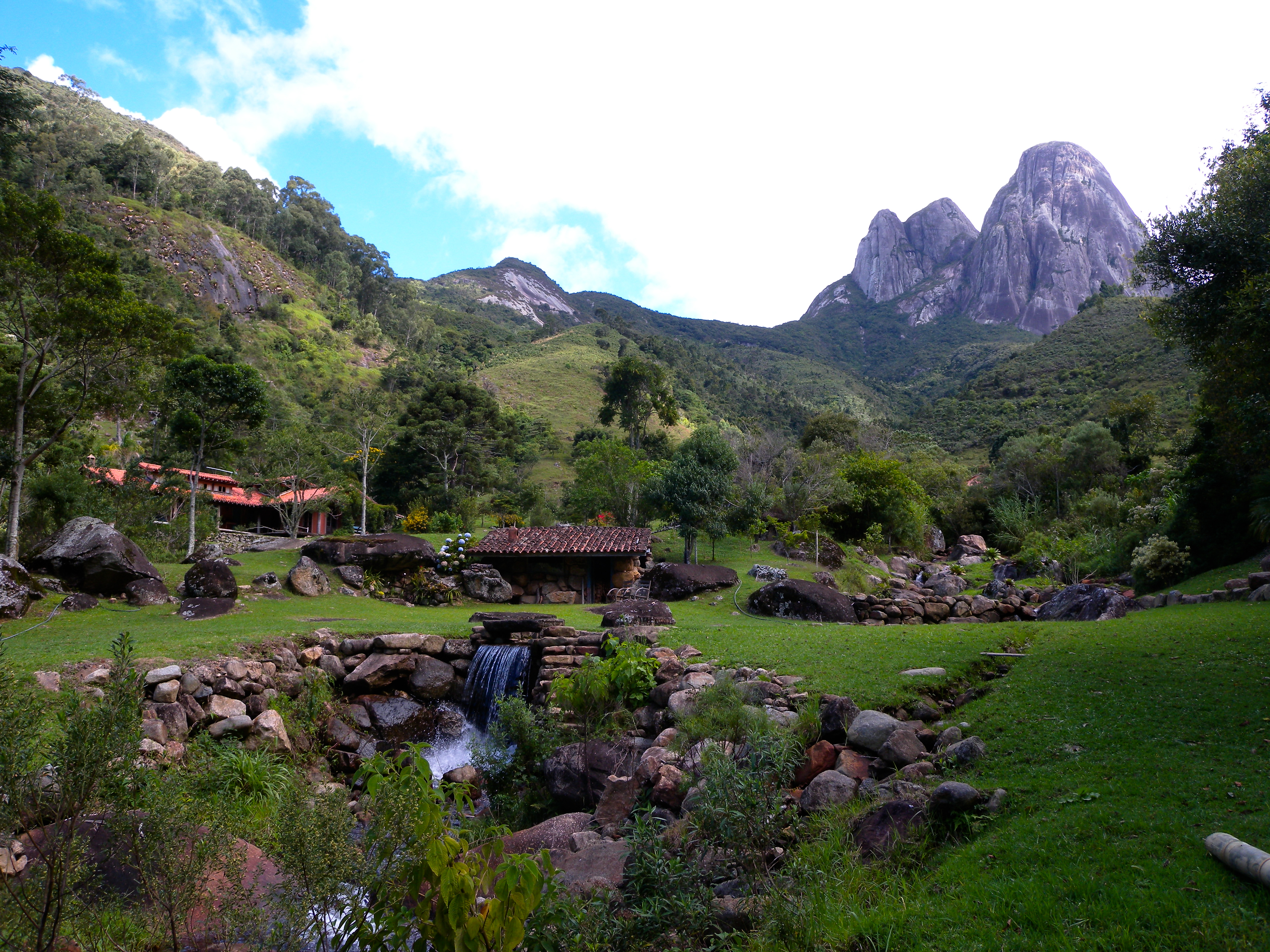 Visual do Caminho Para Parque dos Os tres Picos